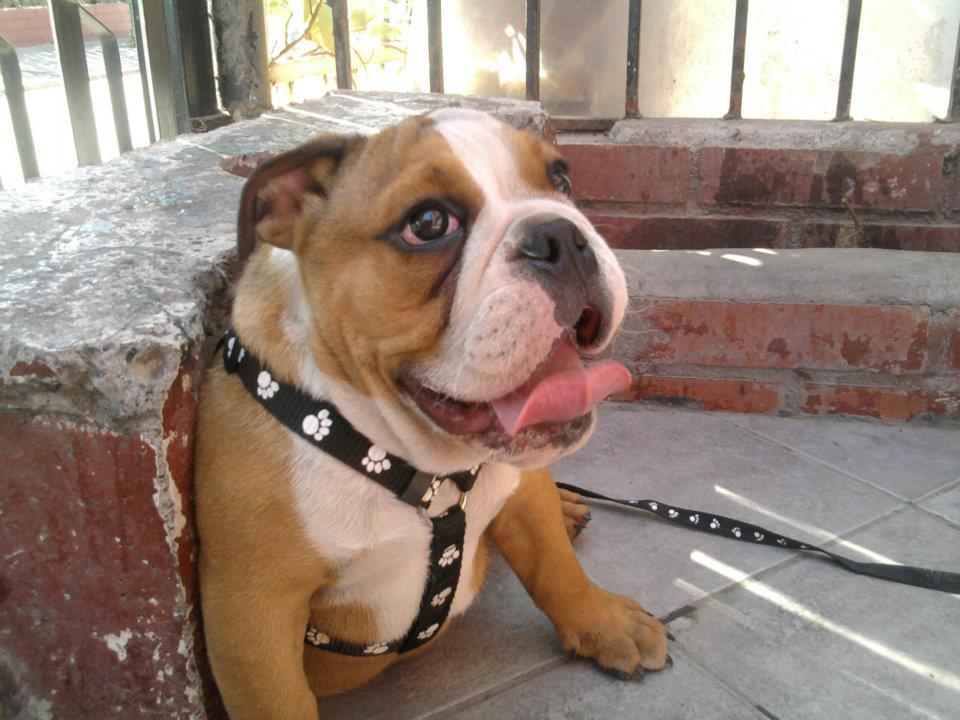 BullDog Ingles "Arturo" de Chile.